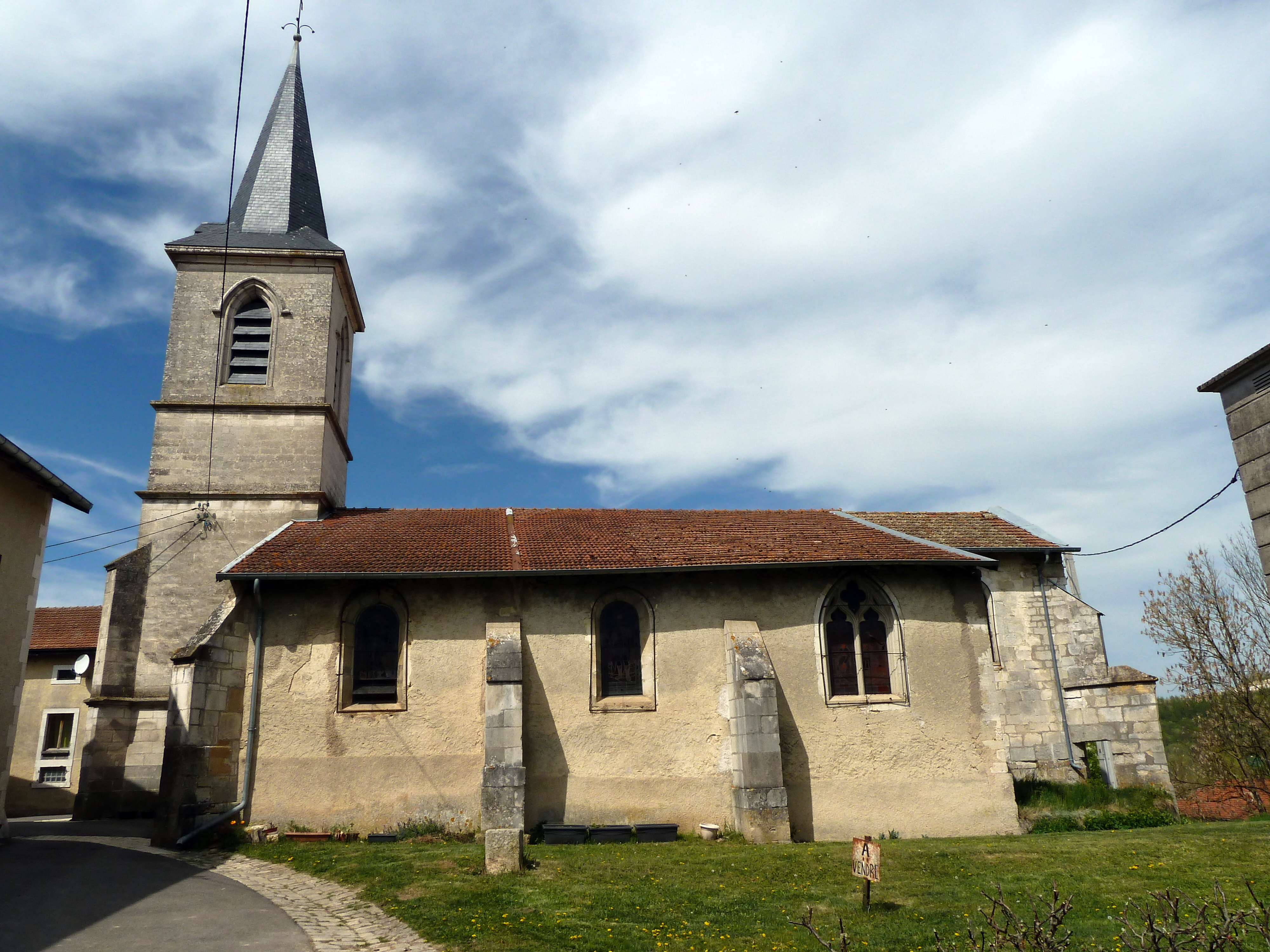 Ugny-sur-Meuse église